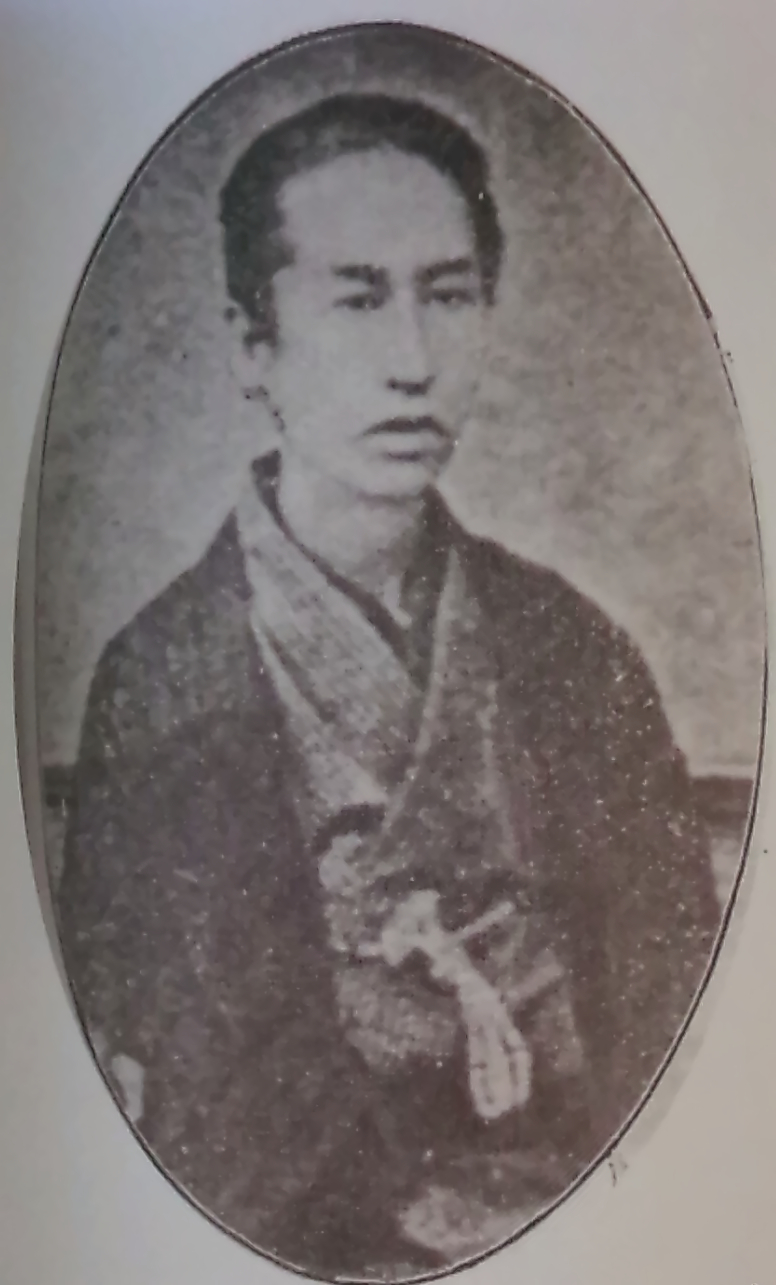 阿部正外の肖像写真。